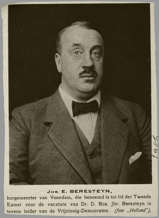 Jhr. Mr. dr. E.A. van Beresteyn